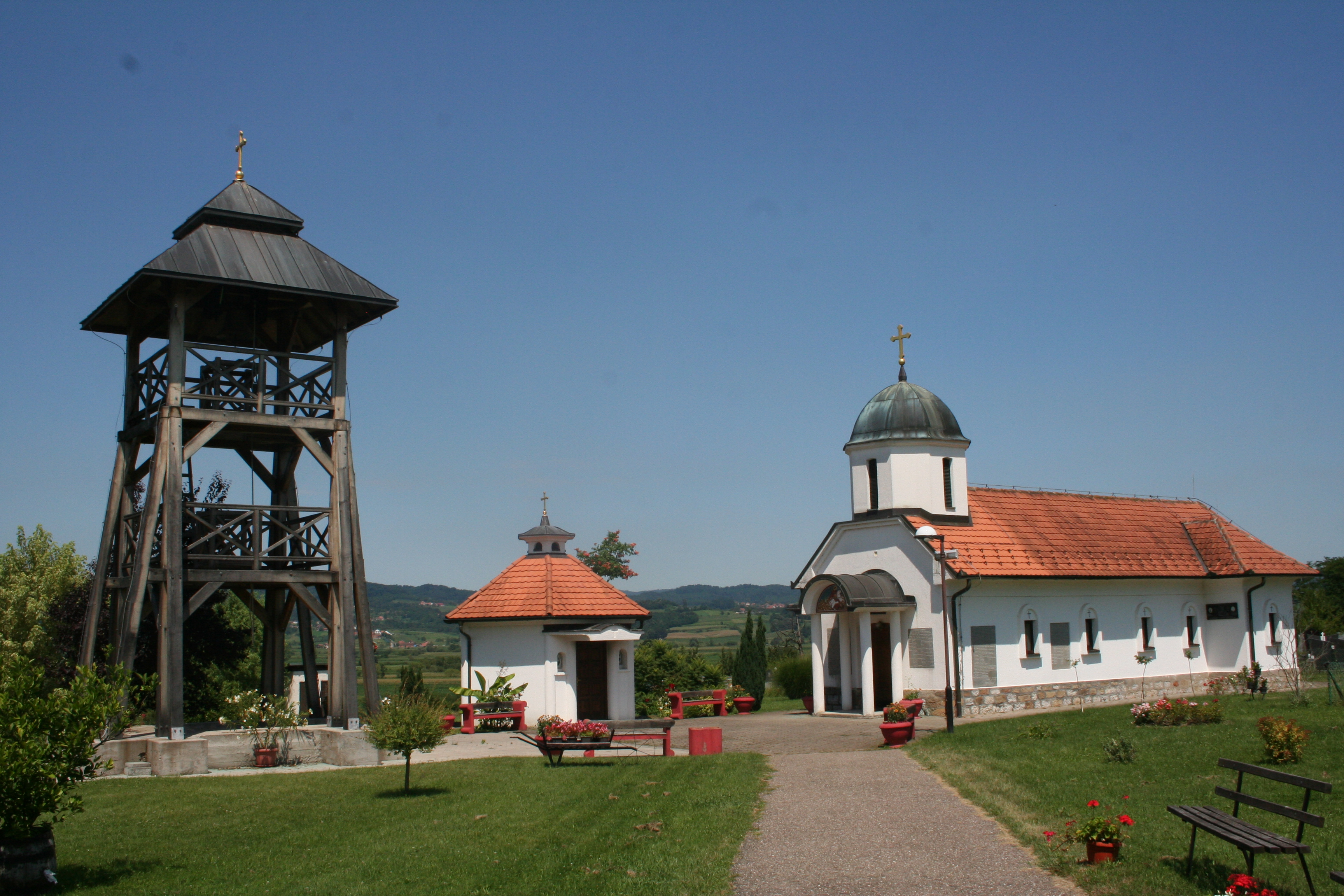 Crkva Sv. Georgija, Gornje Nedeljice